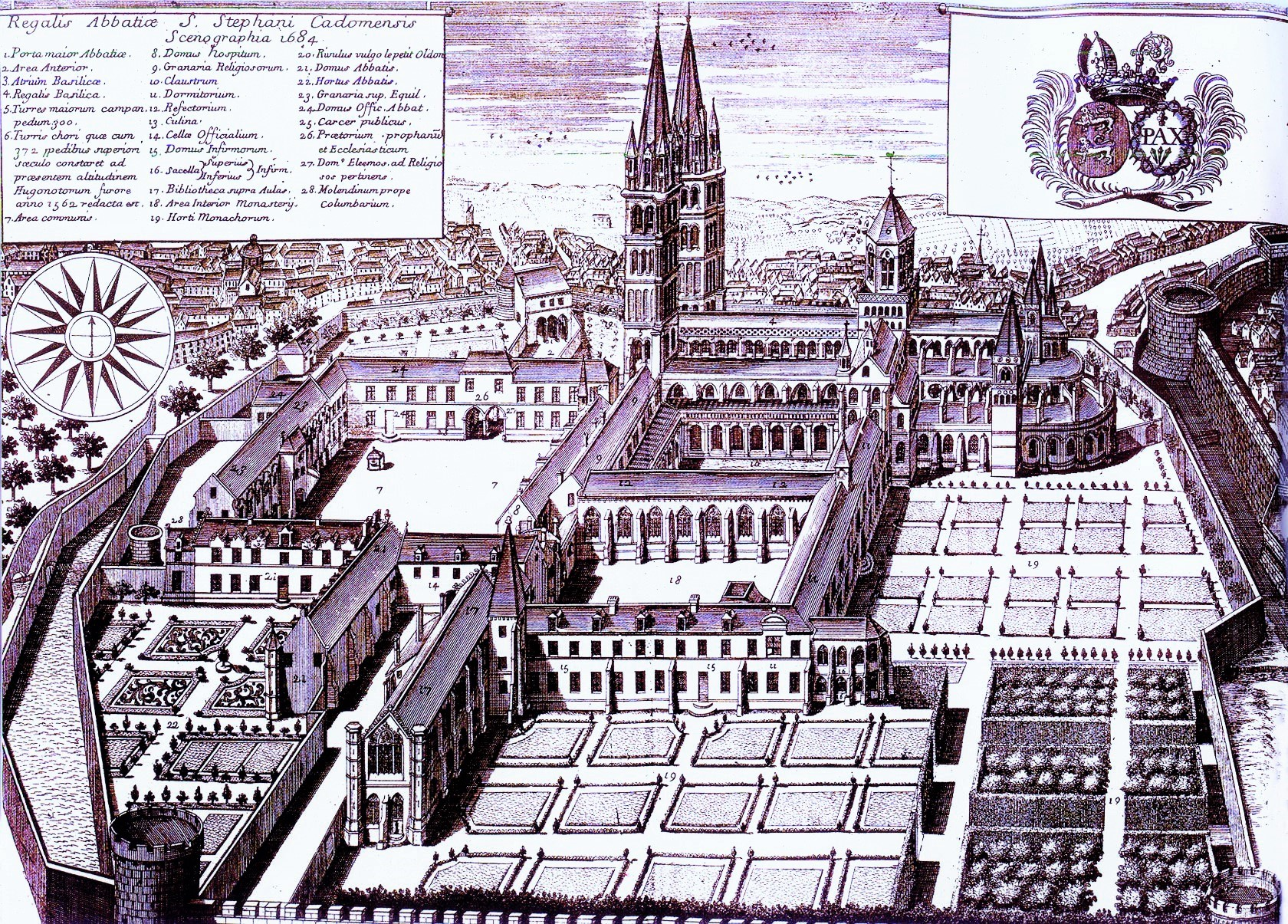 Abbaye aux Hommes, vue des Mauristes (image du domaine public modifiée (Monasticon Gallicanum)